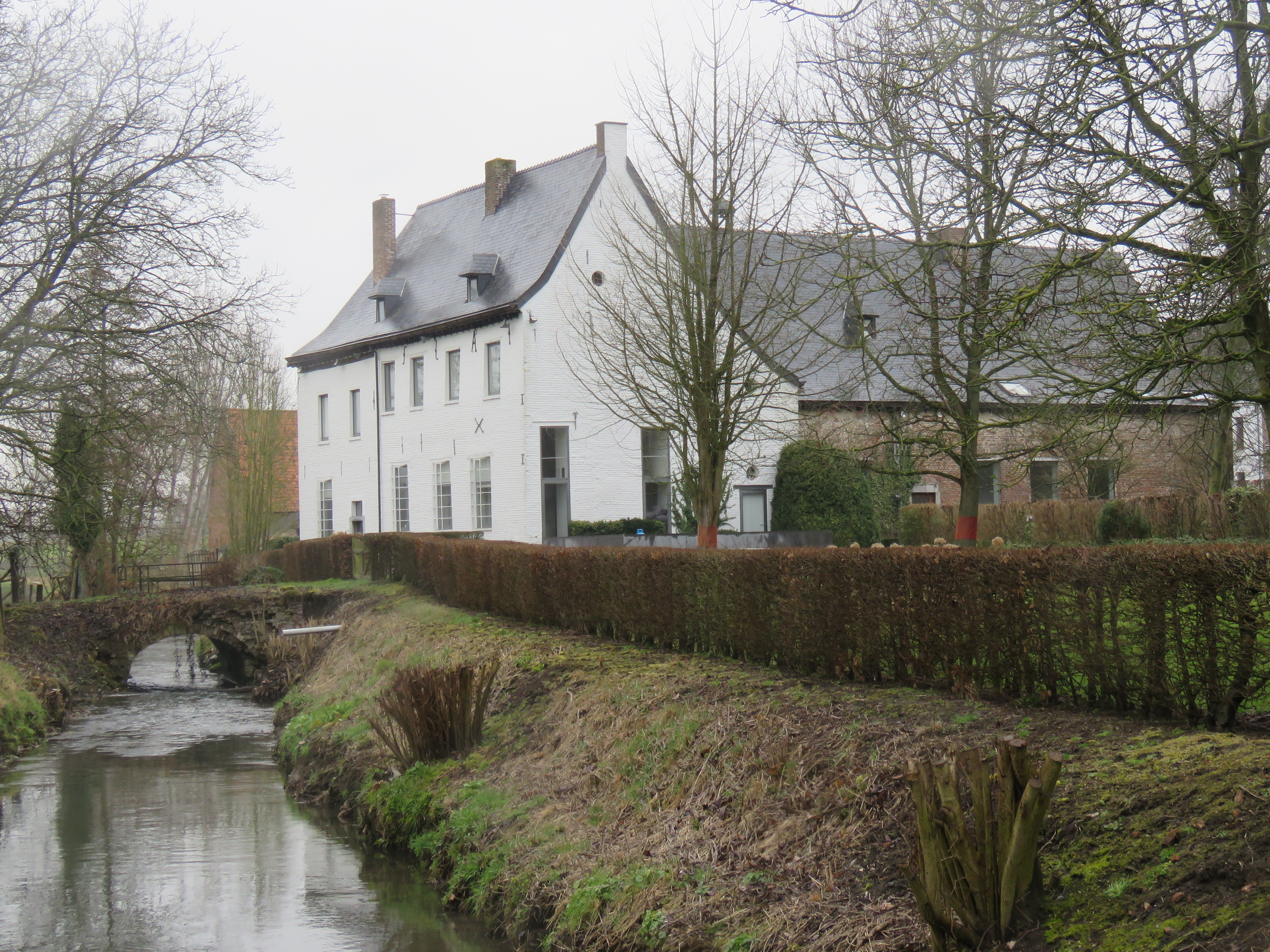 Abdisverblijf van voormalige abdij van Terbeek 17de eeuw in Sint-Truiden (België)